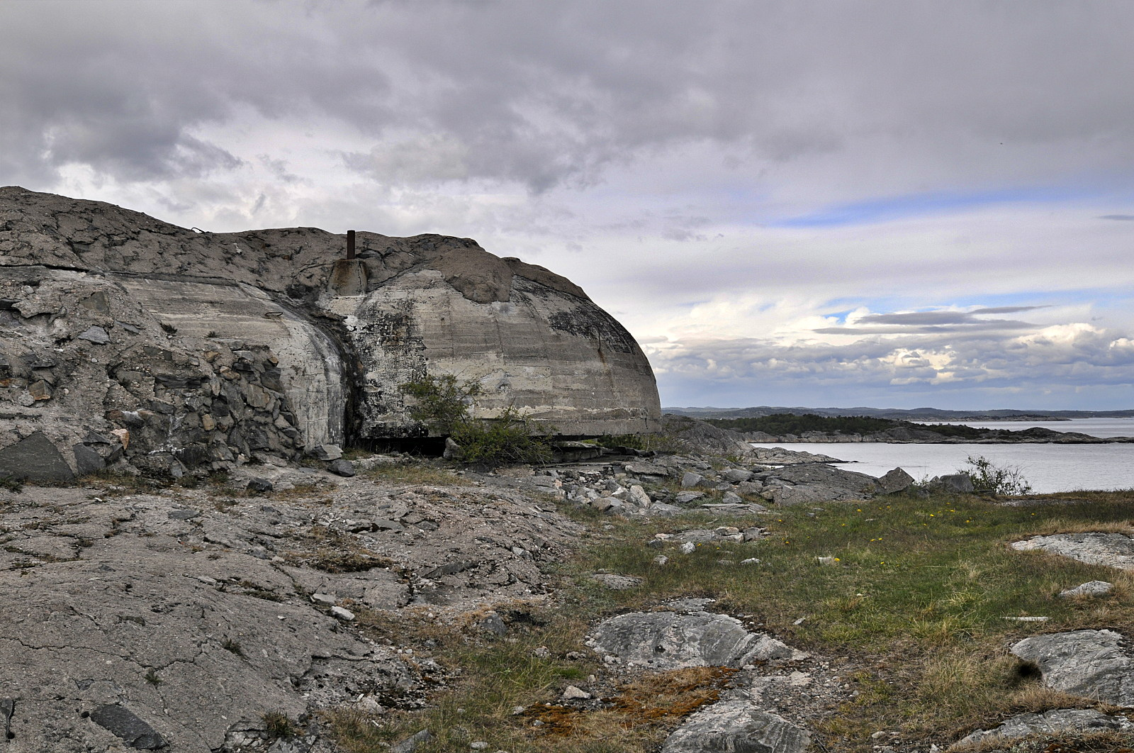 R636 ved Justøya kystfort